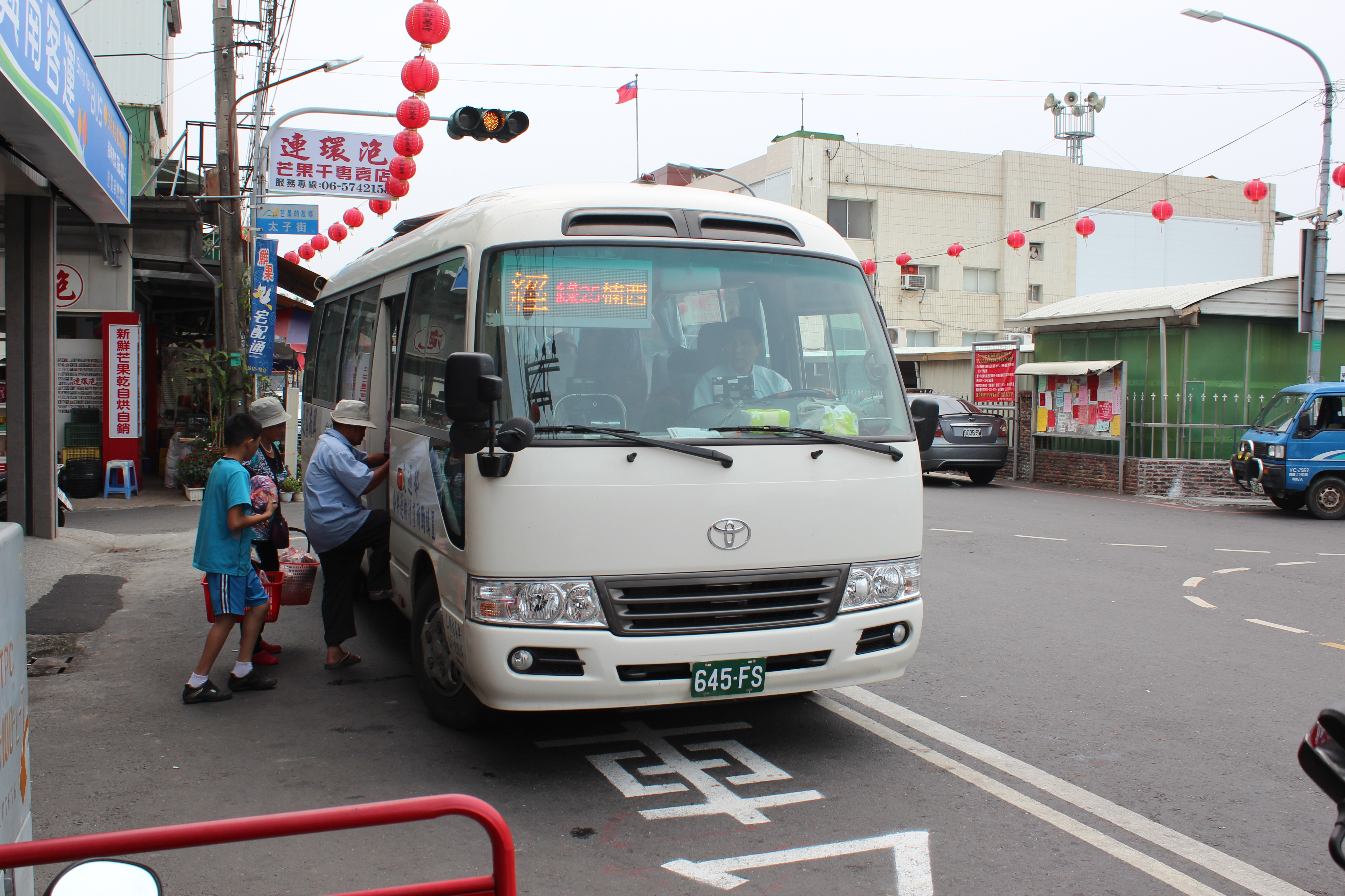 興南客運2011年豐田Coaster XZB50L-ZEMSYR中型巴士645-FS。